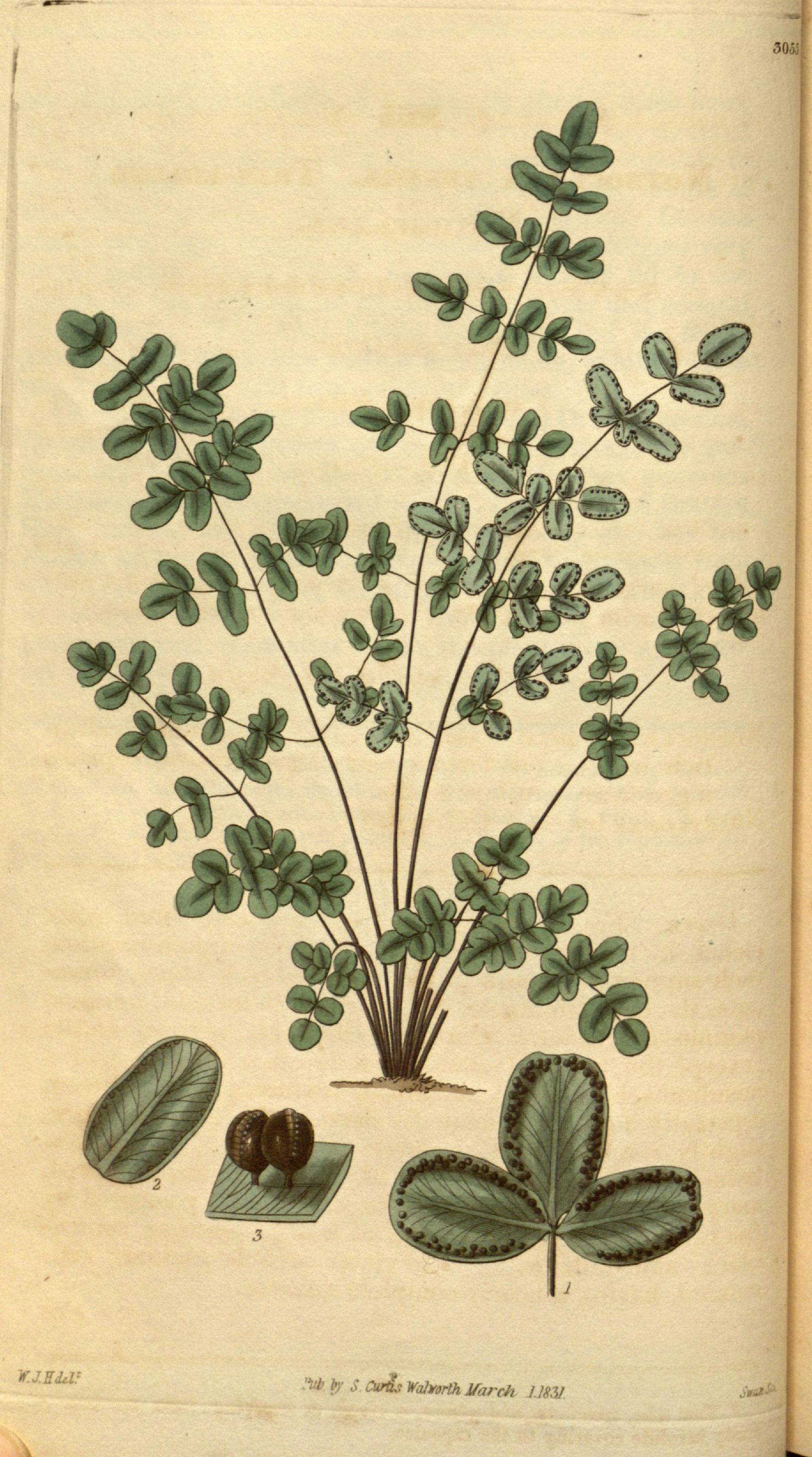 'f. J.EM? .VS.? VaJvorlh Ifarch 1 m/